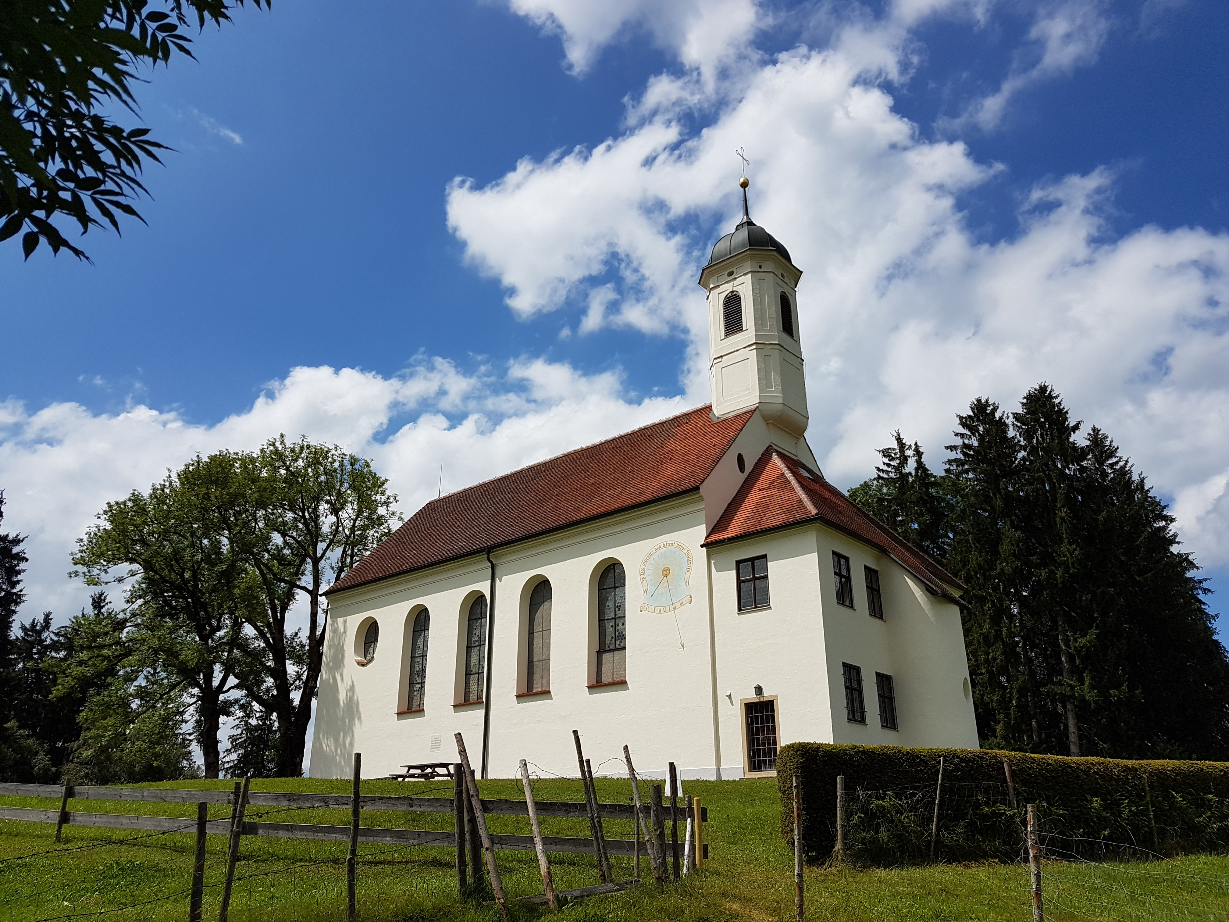 Kreuzberg